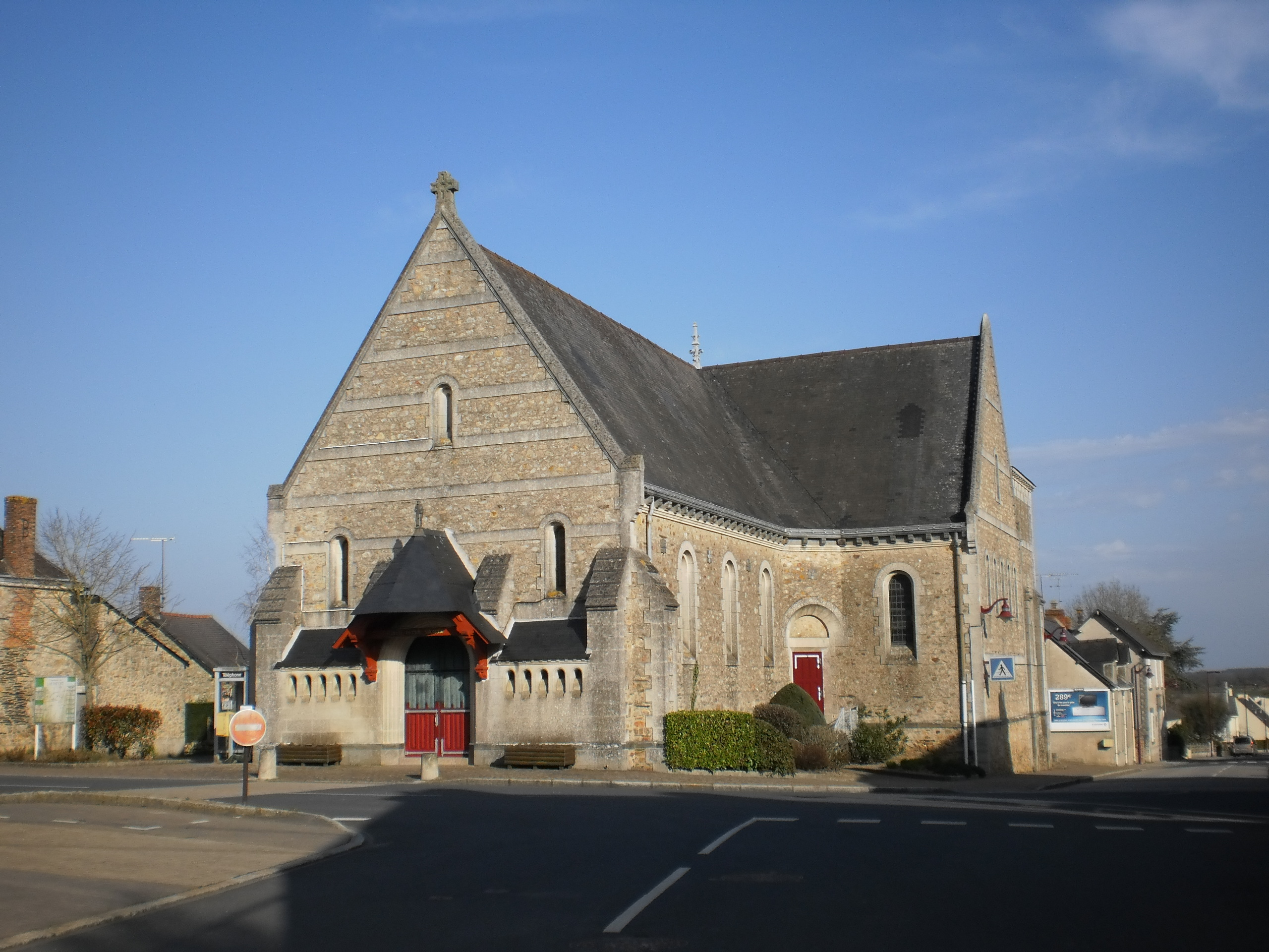 Louisfert (Loire-Atlantique, France) - église